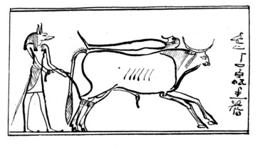 Image réalisée d'après l'illustration n°20 du papyrus Jumilhac, Anubis capture un taureau séthien avec la momie d'Osiris sur son dos